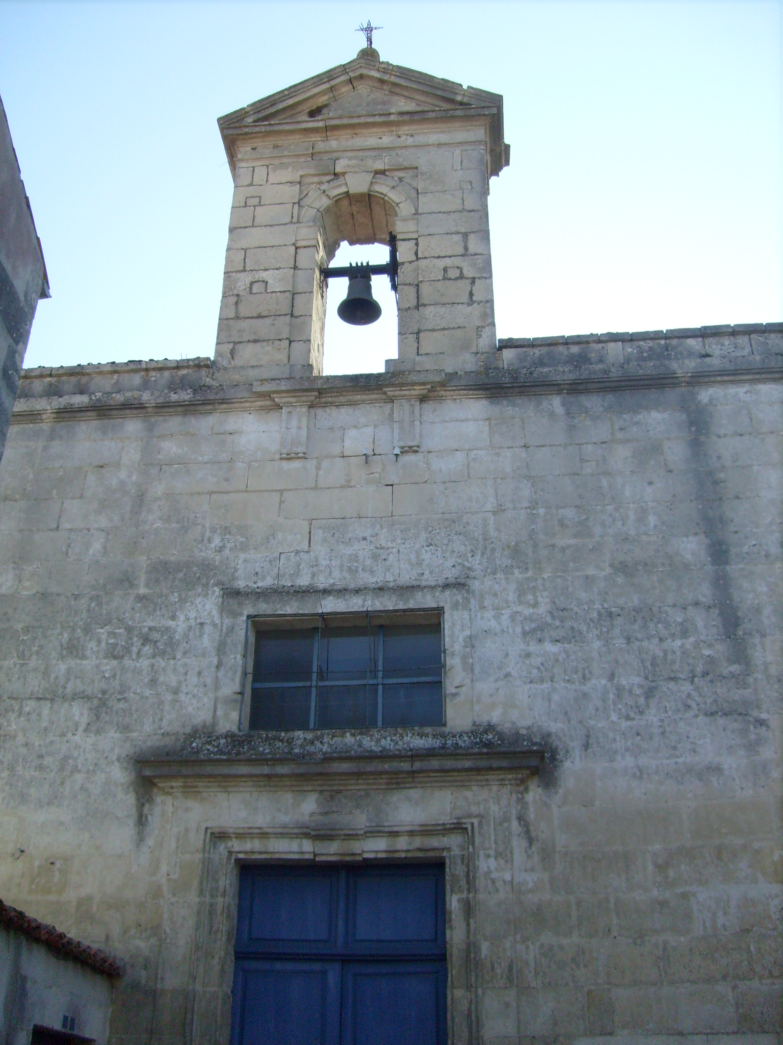 Eglise de Pisany